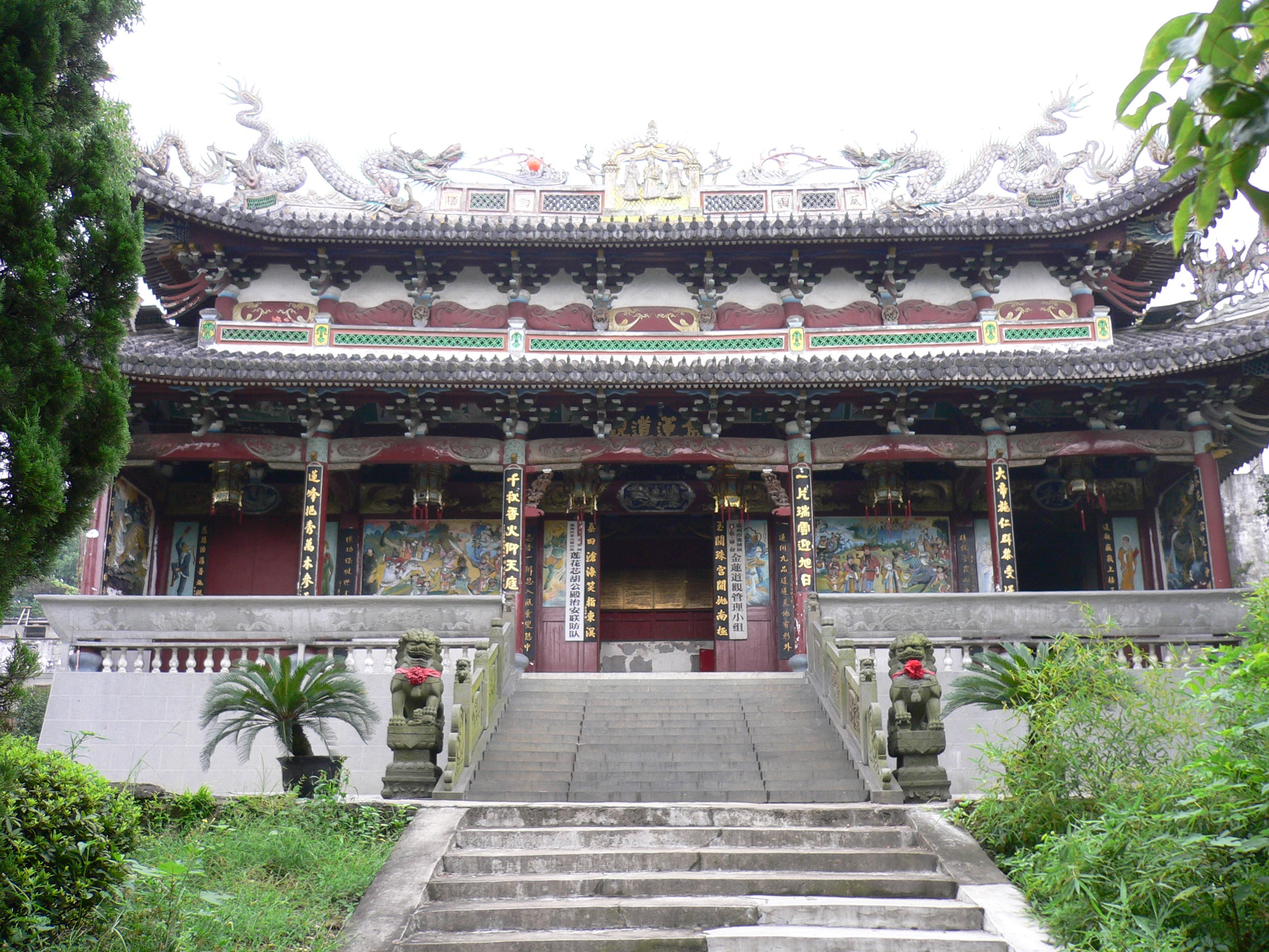 景山顶上的金莲道观 Jǐngshān dǐng shàng de jīnlián dàoguàn.